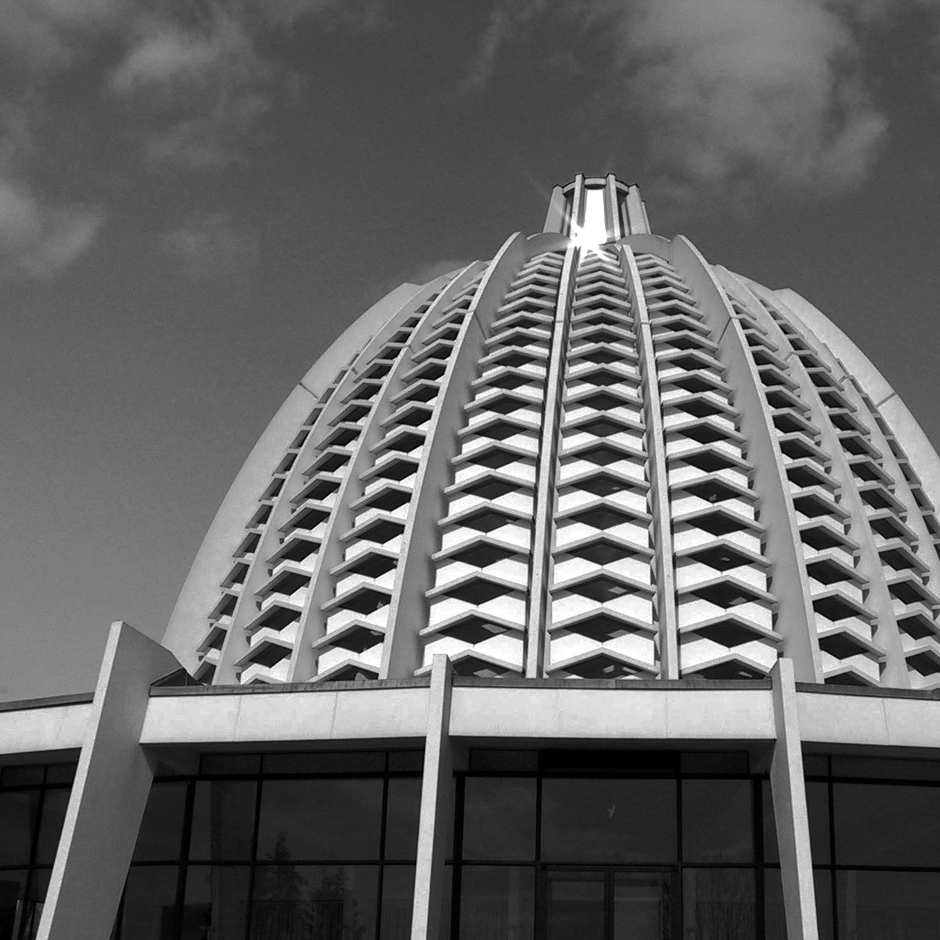 Haus der Andacht (Europäischer Baha'i-Tempel, Hofheim am Taunus, Stadtteil Langenhain, Deutschland)